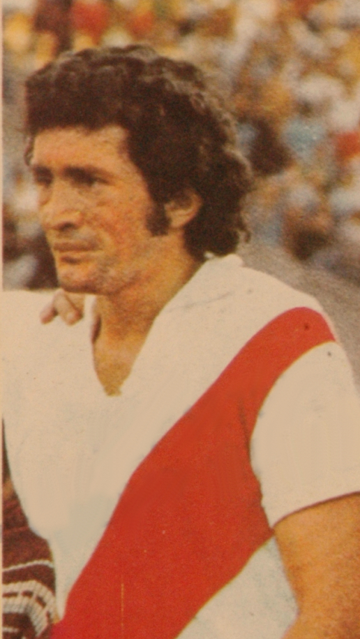 Héctor Oscar Ártico en 1975. Recortado con GIMP desde File:Artico y Perfumo (River) - El Gráfico 2890.jpg